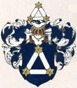 Ditmari ja Dittmari suguvõsa aadlivapp